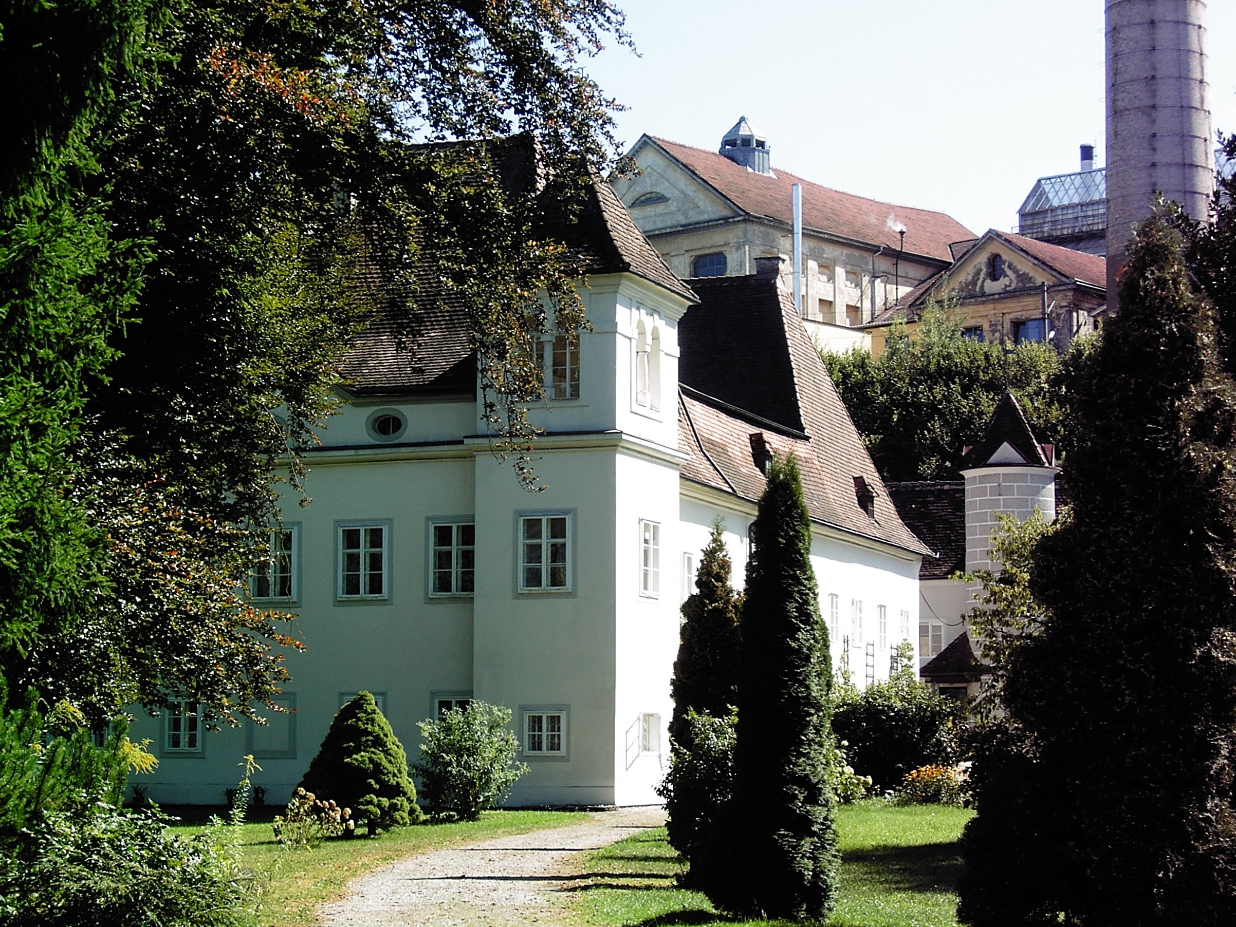 Steyr Schloss Engelhof Haratzmüllerstraße 66, 68, Ansicht von der Haratzmüllerstraße